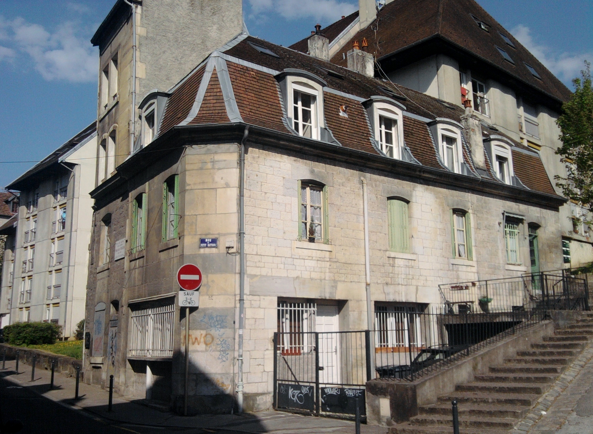 Maison natale de Pierre-Joseph Proudhon (rue du petit Battant), à Besançon (Doubs, France).